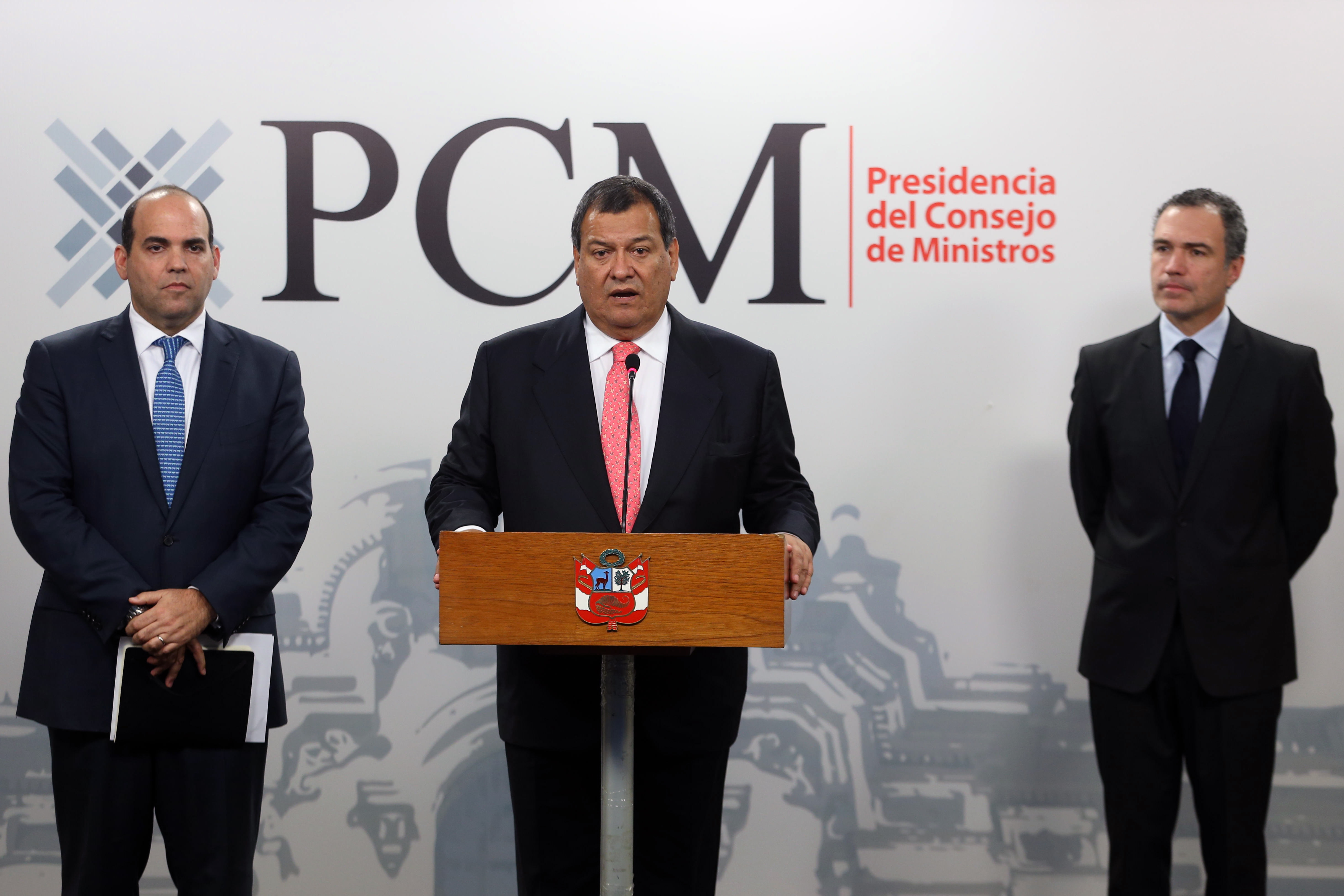 El señor Jorge Nieto Montesinos, Doctor en Ciencias Sociales, Magíster en Ciencia Política y Sociólogo, juramentó como ministro de Estado en el despacho de Defensa.